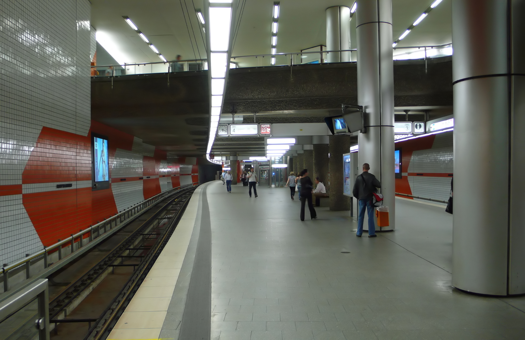 U-Bahnhof Hauptbahnhof der U-Bahn Nürnberg, Bahnsteigebene -2 (U2), Blick von Osten.